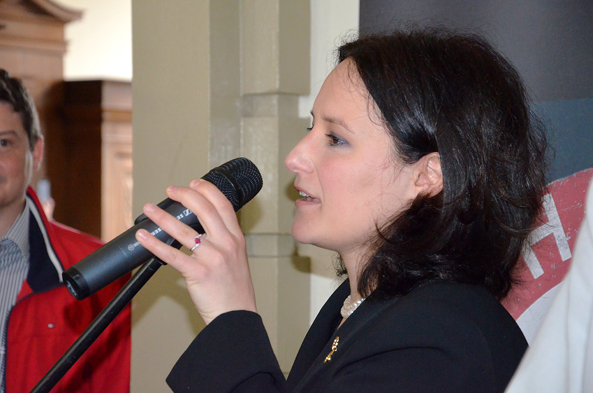 Zur Eröffnung der von der Deutschen Hochschule der Polizei und dem Deutschen Historischen Museum konzipierten Wanderausstellung Ordnung und Vernichtung. Die Polizei im NS-Staat, die vom 5. Mai bis 14. Juni 2015 in der Polizeidirektion Hannover mit ergänzendem niedersächsischen Schwerpunkt gezeigt wird, sprach auch die Dirigentin des Polizeichores Hannover, Diliana Michailov ...